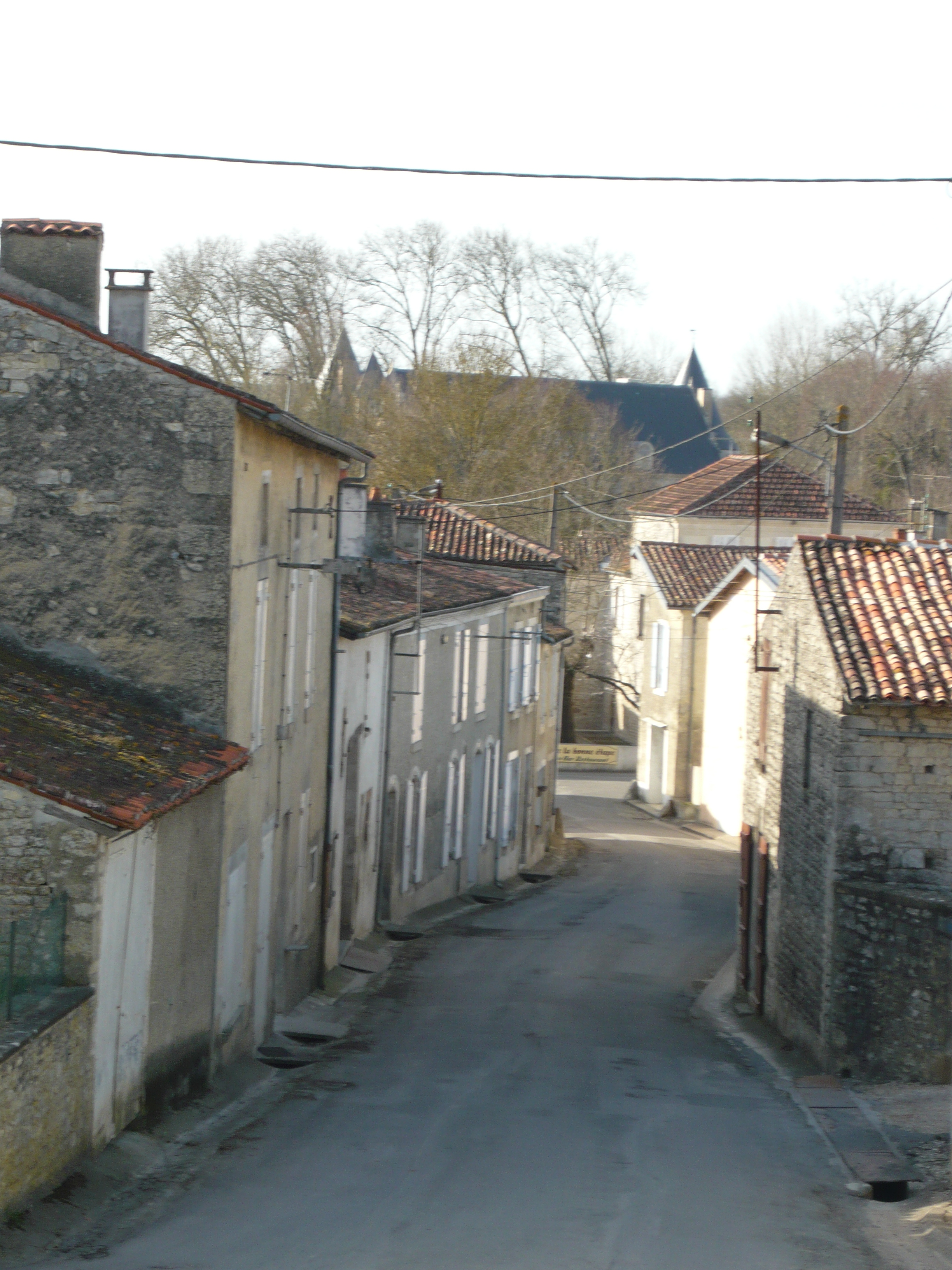 La route d'Aulnay dans le village de Dampierre-sur-Boutonne (17)